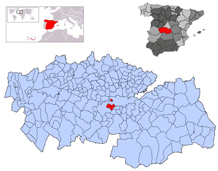 Guadamur en la provincia de Toledo